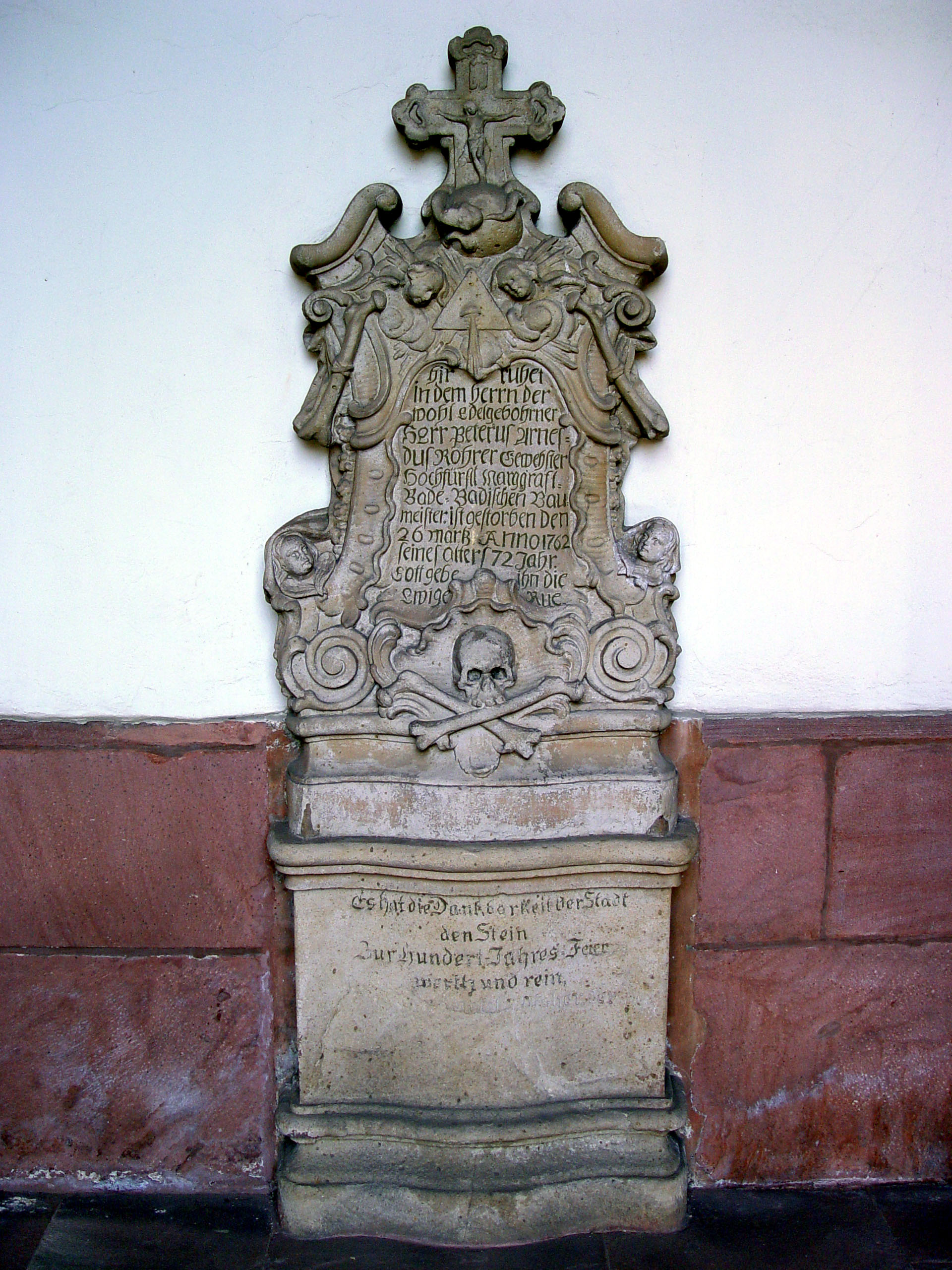 Fotografiert von Martin Dürrschnabel. Grabstein von Johann Peter Ernst Rohrer am Eingang der Stadtkirche St. Alexander in Rastatt.